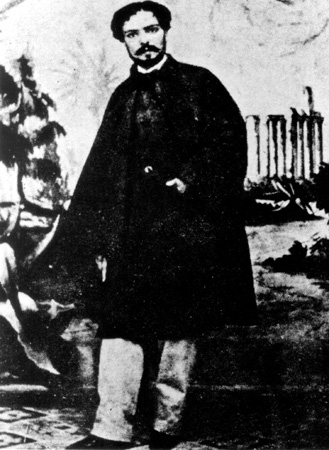 Fotografía de Emmanuel Royidis